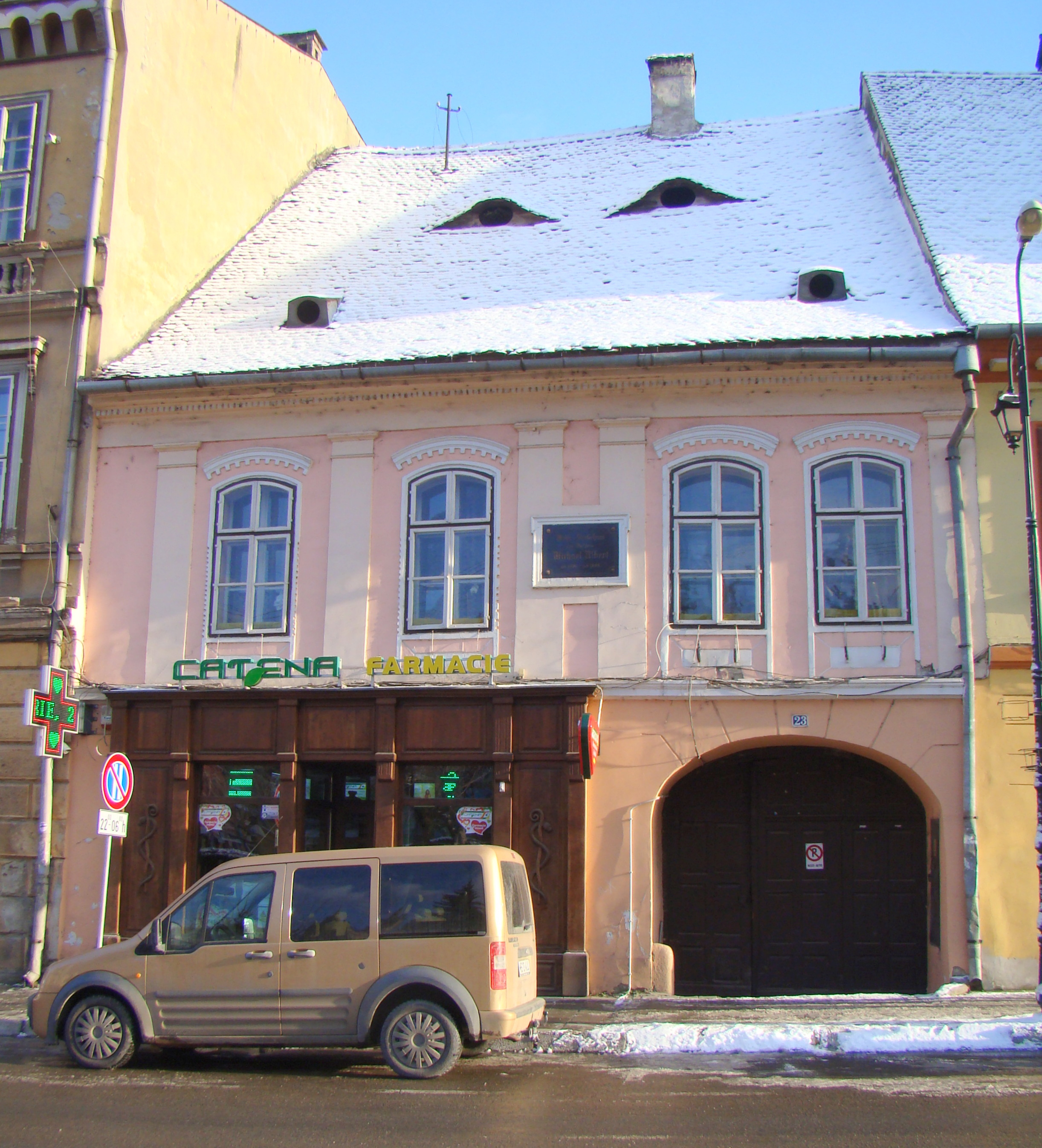 Casa în care a locuit Michael Albert (1836-1893), pedagog și scriitor, municipiul Sighișoara, Piața Oberth Hermann 23 1700 - 1725, 1820